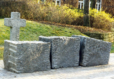 Markus Wolf - Stein des Gedenkens (2000)